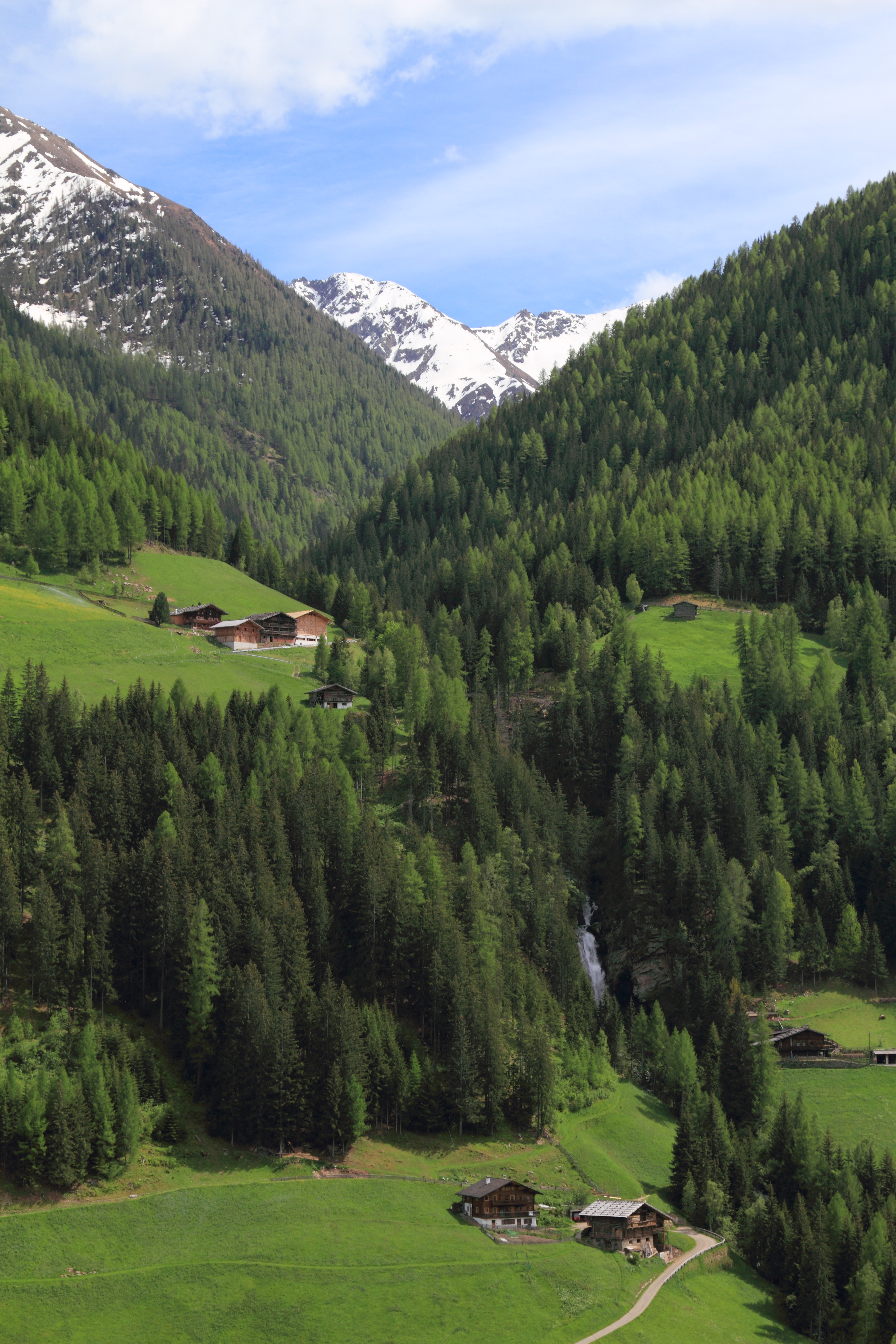 Val d'Ultimo - Ultental